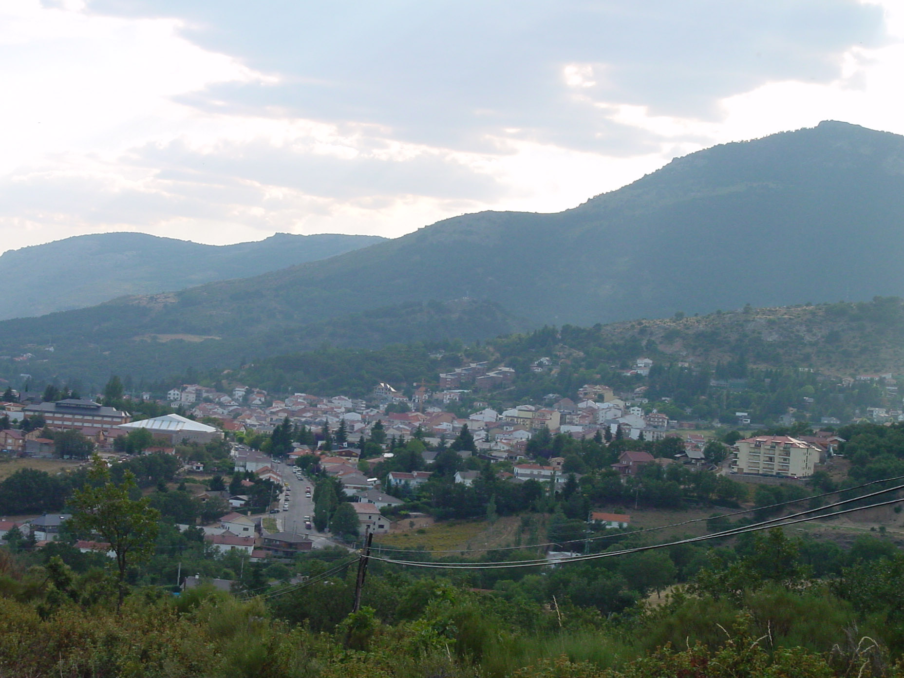 Vista aérea de Cercedilla.